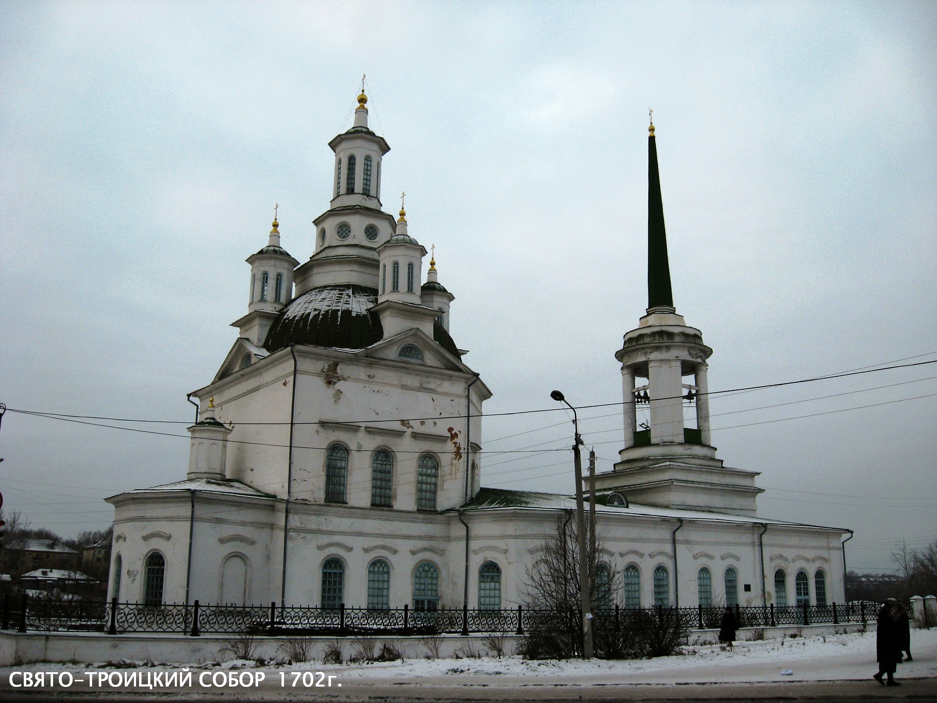 Алексеевская церковь (Свято-Троицкий собор) (Свердловская область, Алапаевск, улица Чайковского, 19)